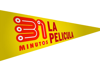 Logotipo utilizado en el afiche chileno de 31 minutos, la película